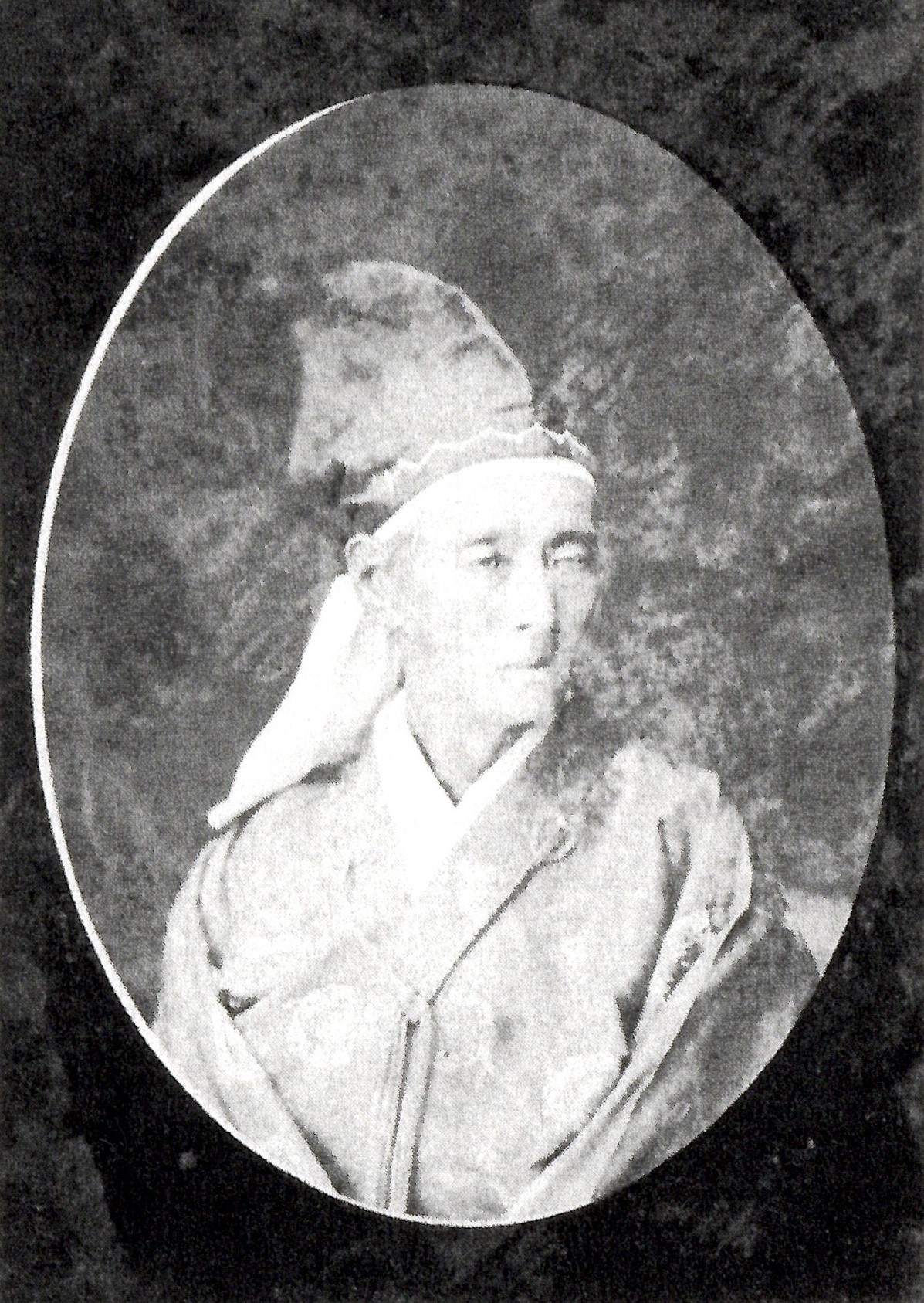 中川久昭の肖像写真。